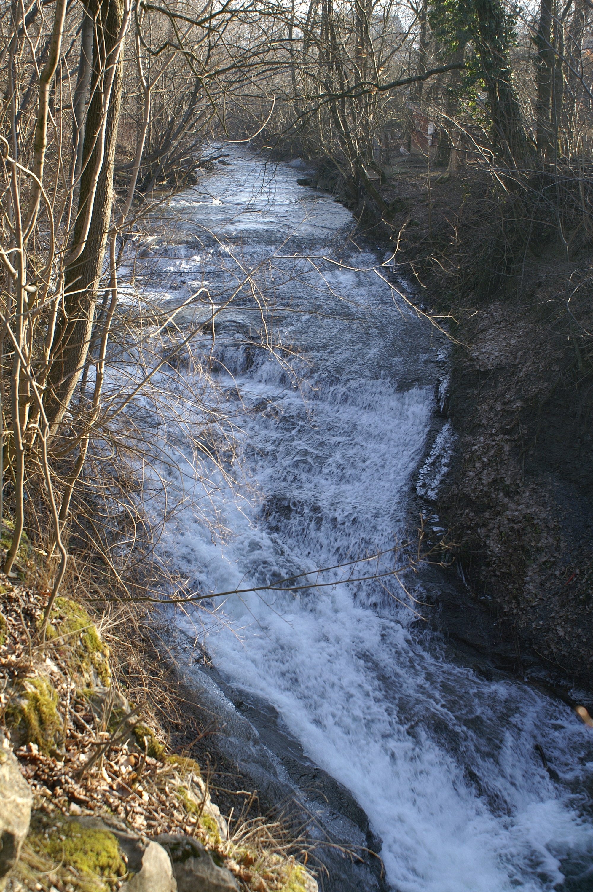 Wasserfall der Lauter in Donzdorf